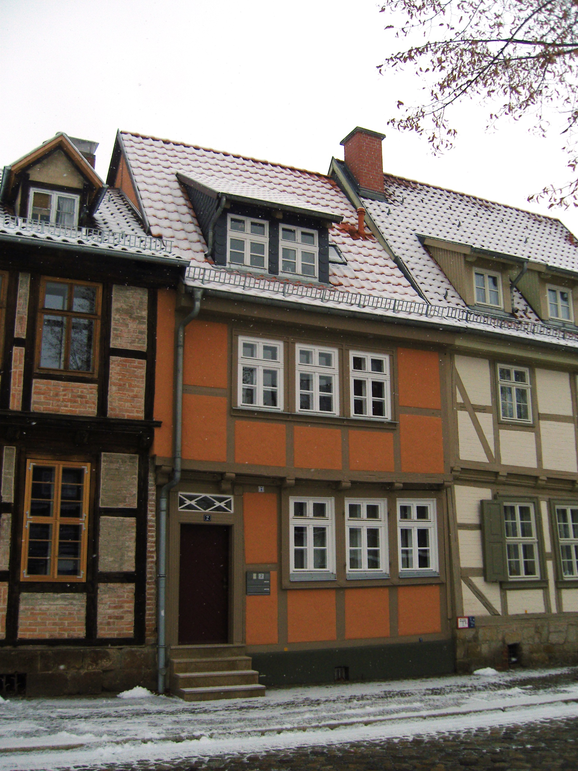 Denkmalgeschütztes Wohnhaus in der Straße Klink 2 in Quedlinburg